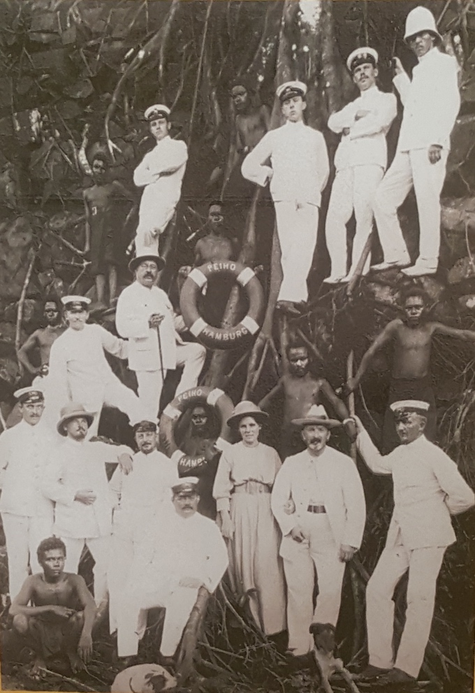 Ein Teil der Besatzung des Forschungsdampfers Peiho und Melanesiern, darunter das Ethnologenpaar Augustin und Elisabeth Krämer (unten Mitte). Reproduktion ohne Herkunftsangabe, Etpison-Museum in Koror, Palau